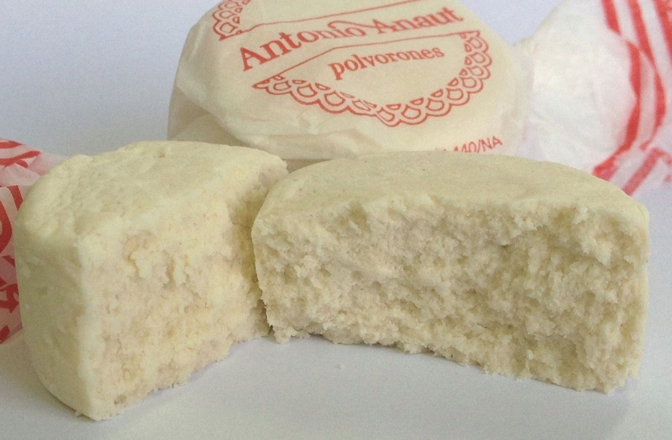 Los polvorones tradicionales de Navarra se diferencian por su textura, más fina, y su color, más claro.